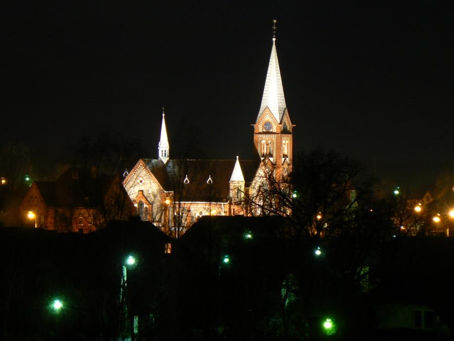 Zdjęcie nocne kościoła pw. Marii Magdaleny